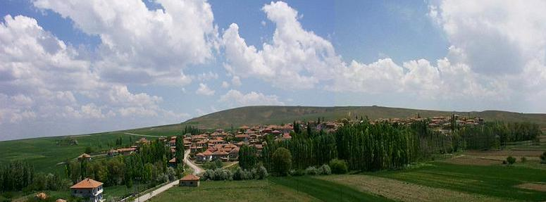 Köşektaş Köyü Manzarası